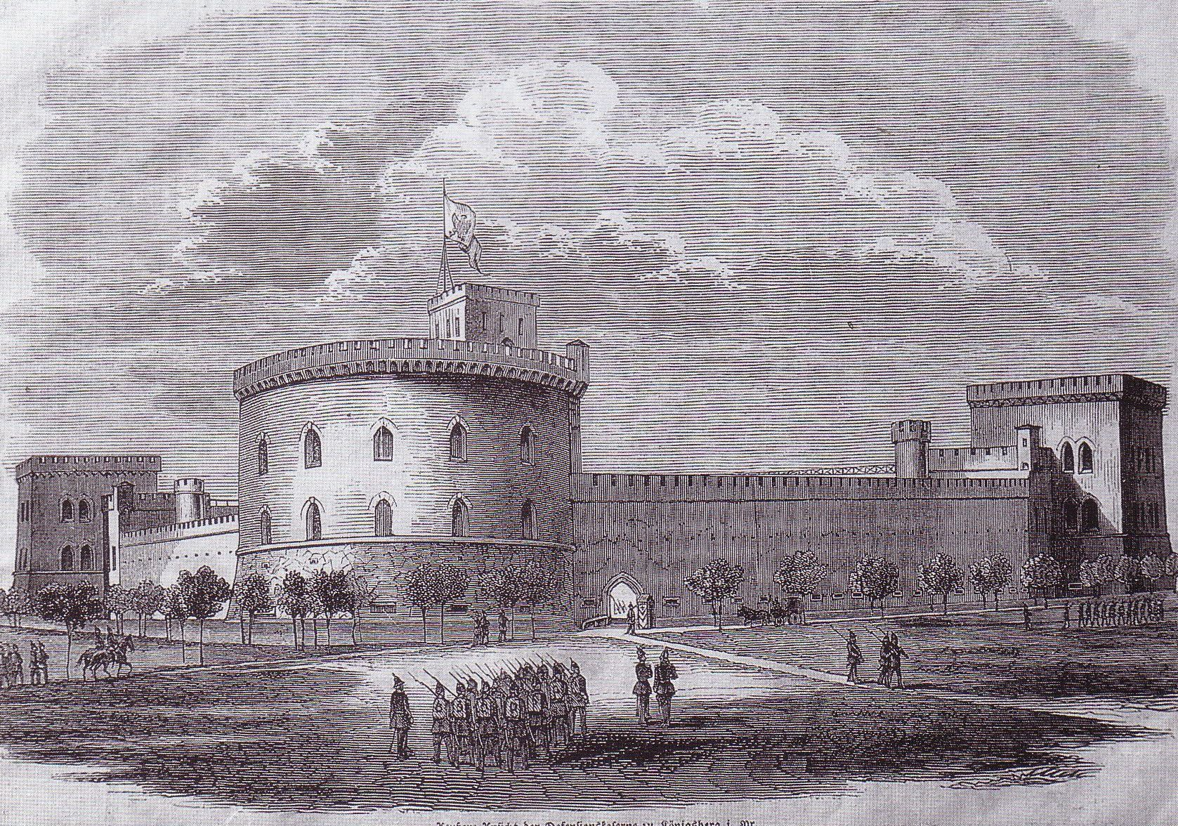 Wood engraving of the Defensionskaserne (defence barracks) in Königsberg